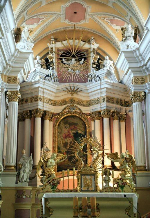 Polska